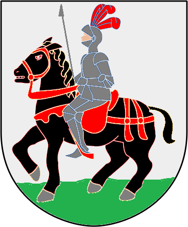 Stemma della nobile famiglia Del Conte di Milano, Italia